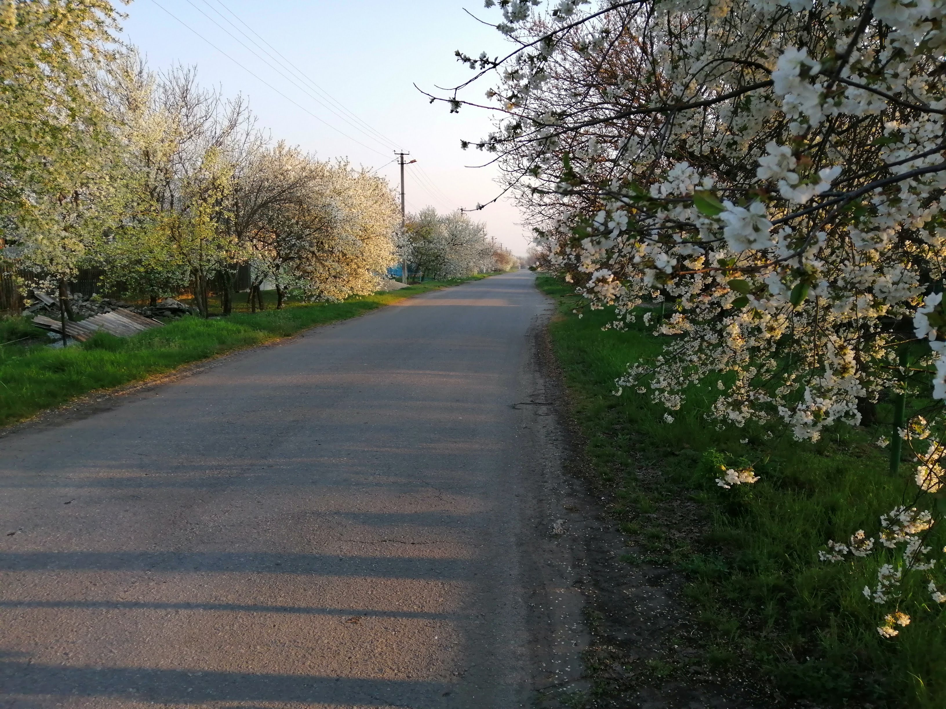 Цвітіння вишень при дорозі